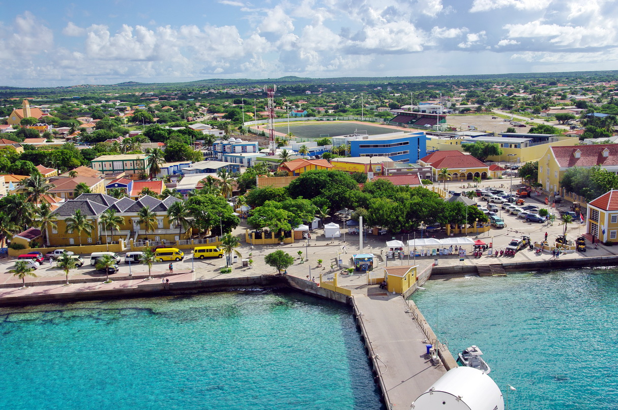 Bonaire, Hafen von Kralendijk